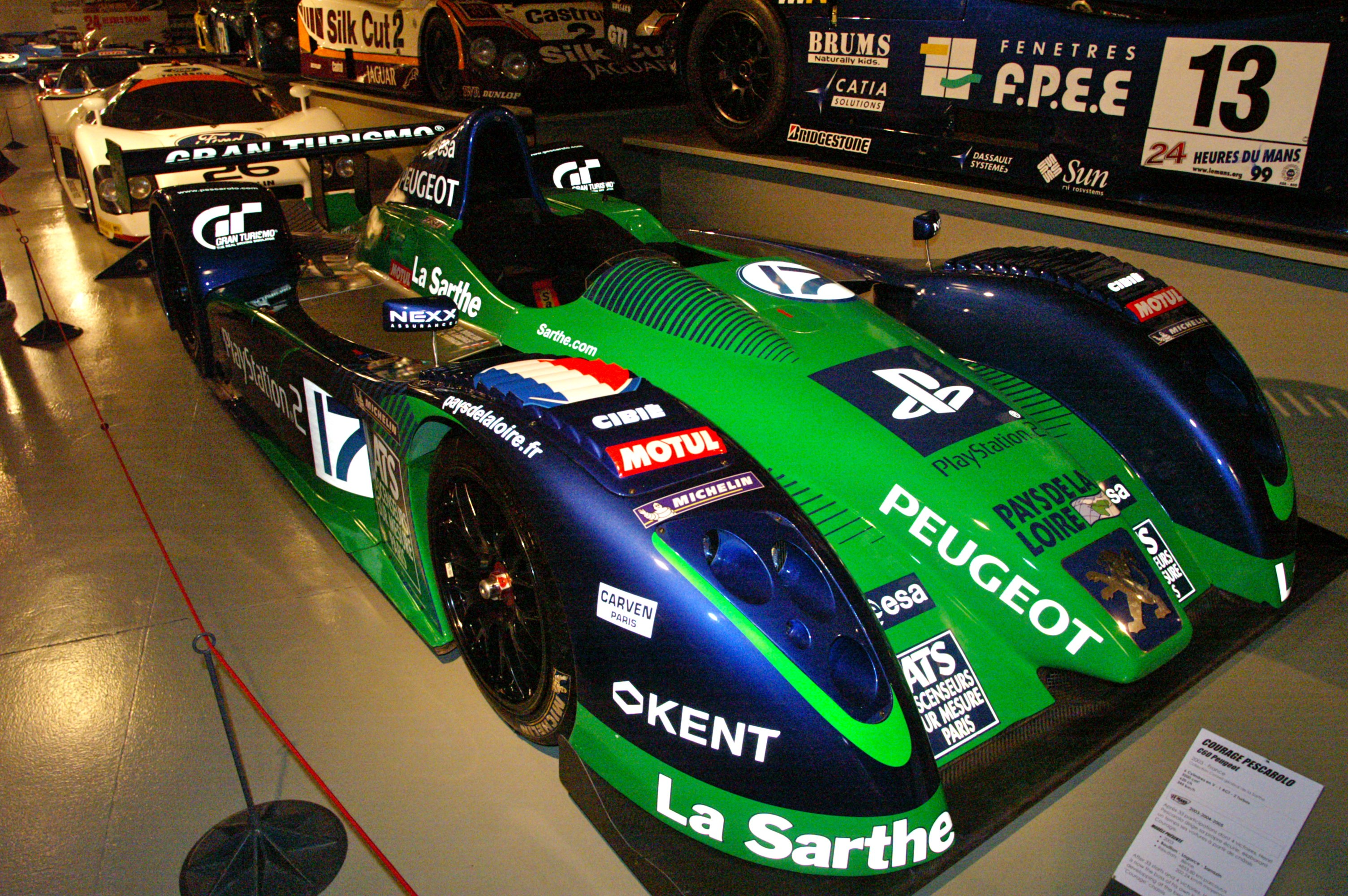 Le Musee des 24 Heures. 2nd @ le Mans 2005 and 2006